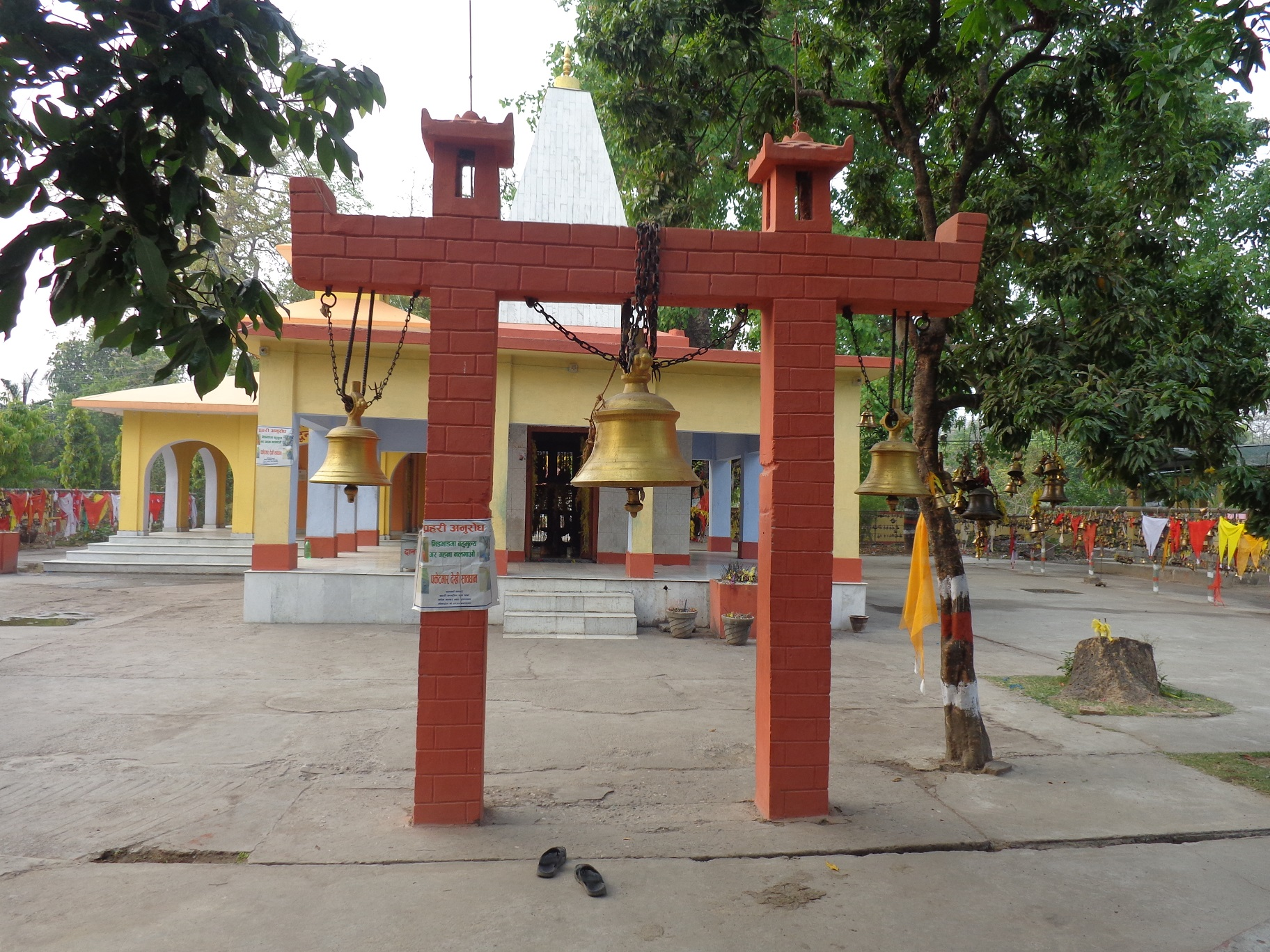 नेपाल भाषा: Siddhanath Dewata